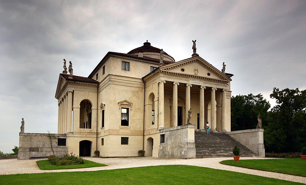 Villa Rotonda, Veneto, Italy